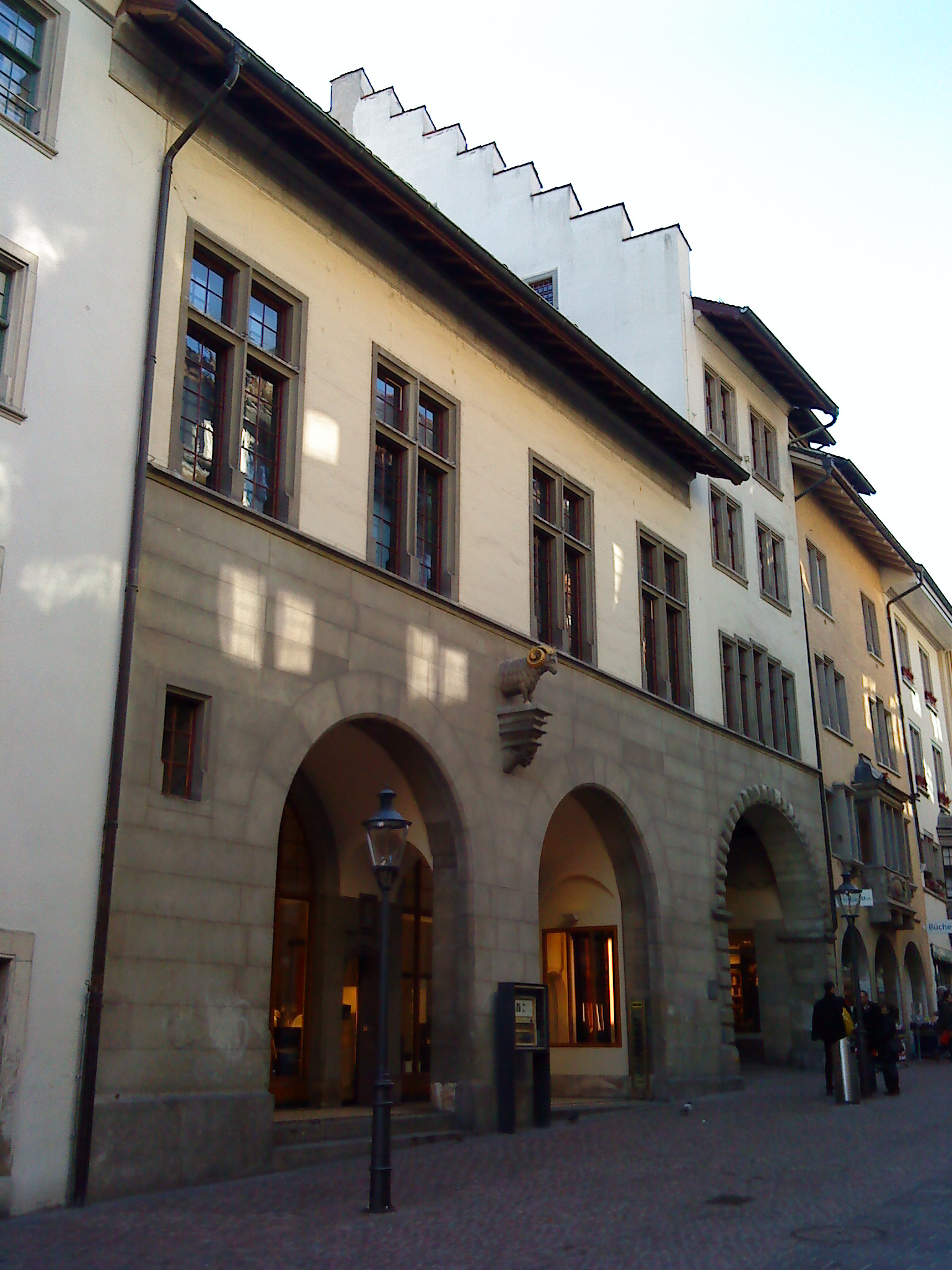 Rathaus (Rathauslaube) Richtung Vordergasse in Schaffhausen/Schweiz.